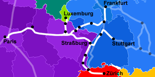 Streckennetz des Rhealys.